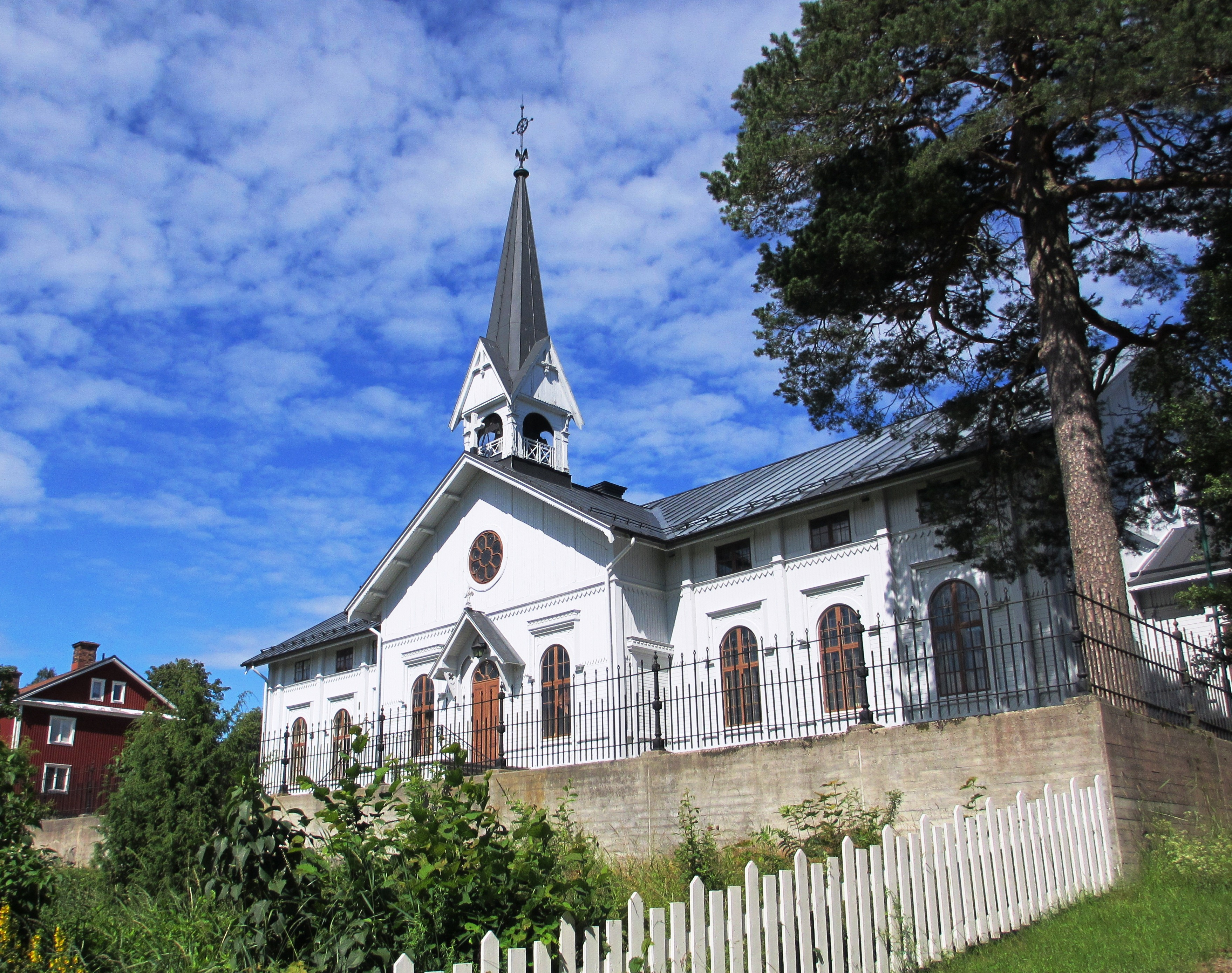 Ljusne kyrka